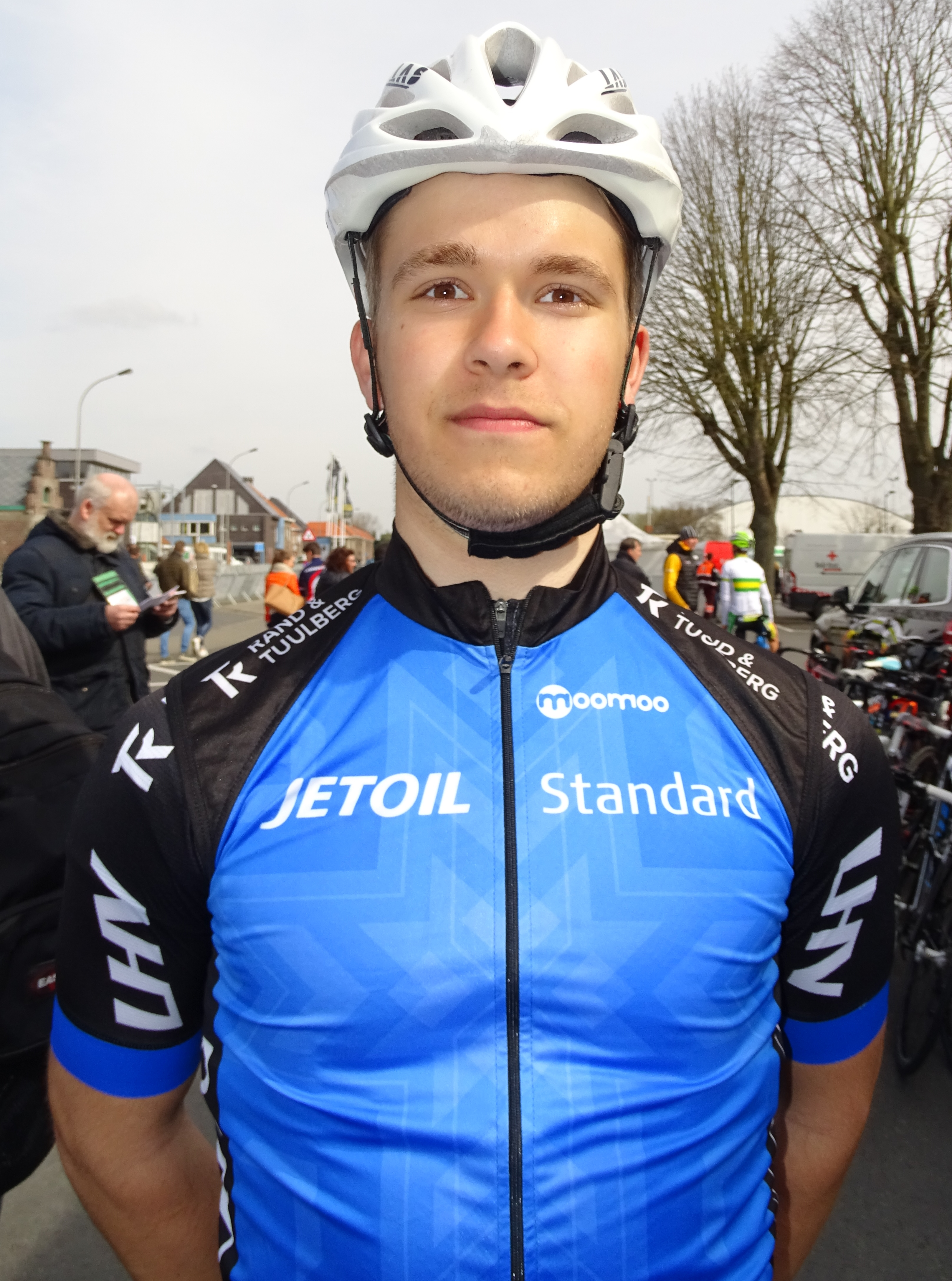 Reportage réalisé le samedi 9 avril à l'occasion du départ et de l'arrivée du Tour des Flandres espoirs 2016 à Audenarde, Belgique.